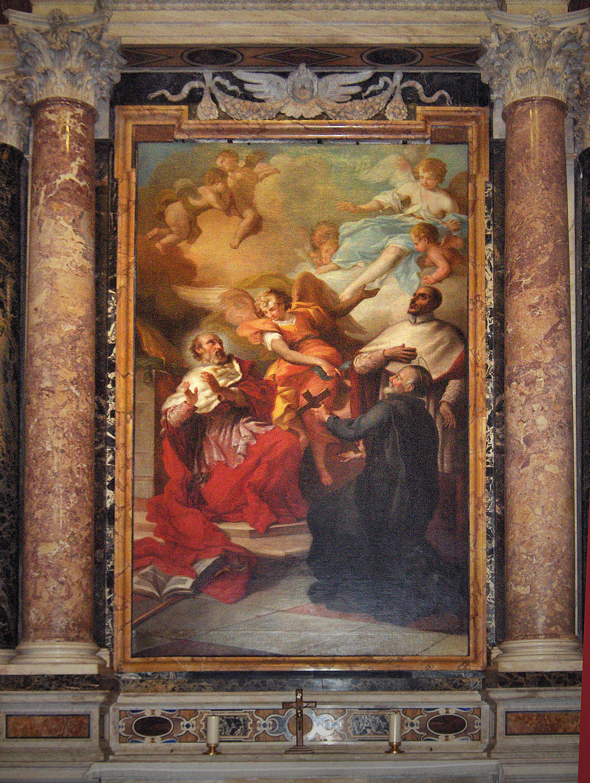 Altarpiece